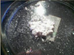 Dargestelltes Silberfulminat